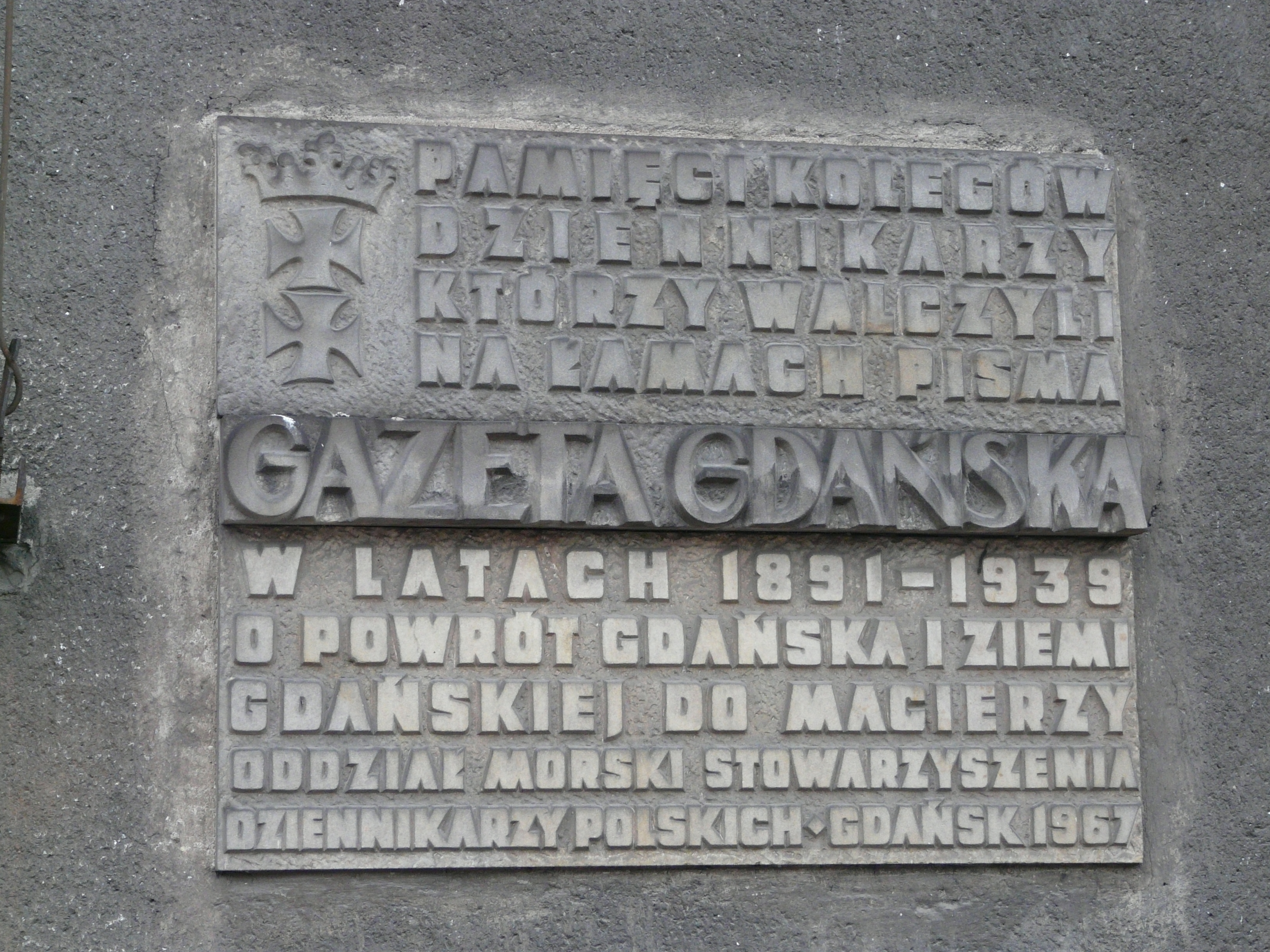 „Gazeta Gdańska”. Gdańsk, Targ Drzewny 3-7.